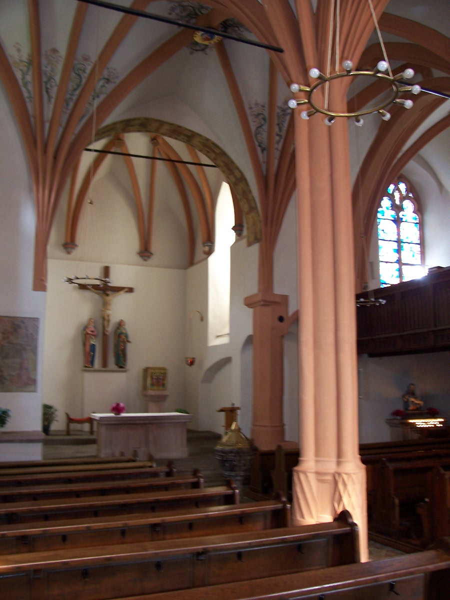 Zentralsäule St. Johann Baptist (Dahlem-Kronenburg)